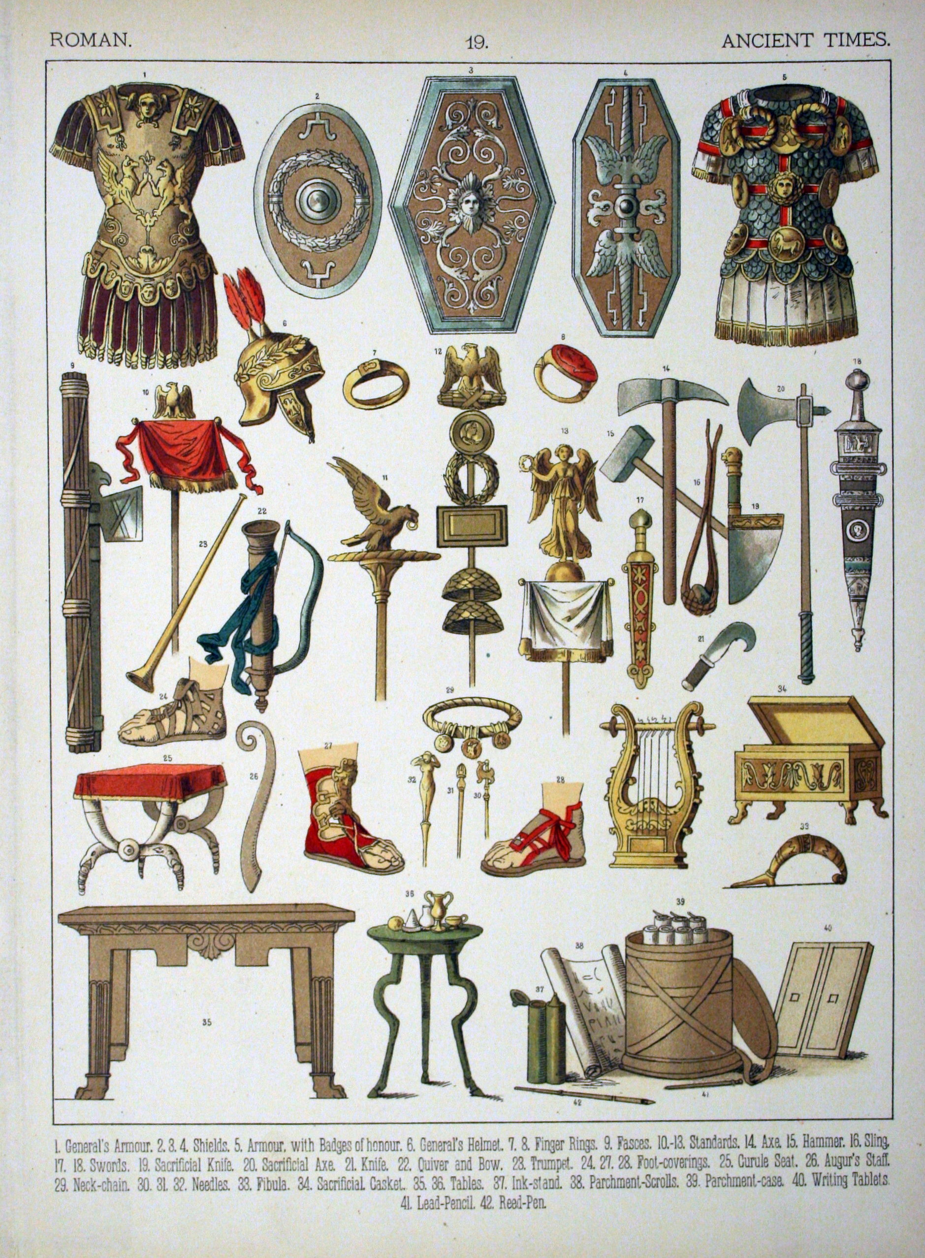 Ancient Times, Roman Detail